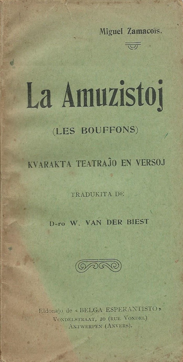 kovrilo de "La Amuzistoj", 1913